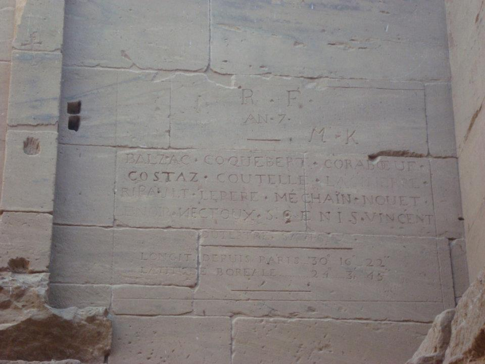 mur du temple de Philae ou figurent les noms des membres de l'expedition d'egypte de Napoléon